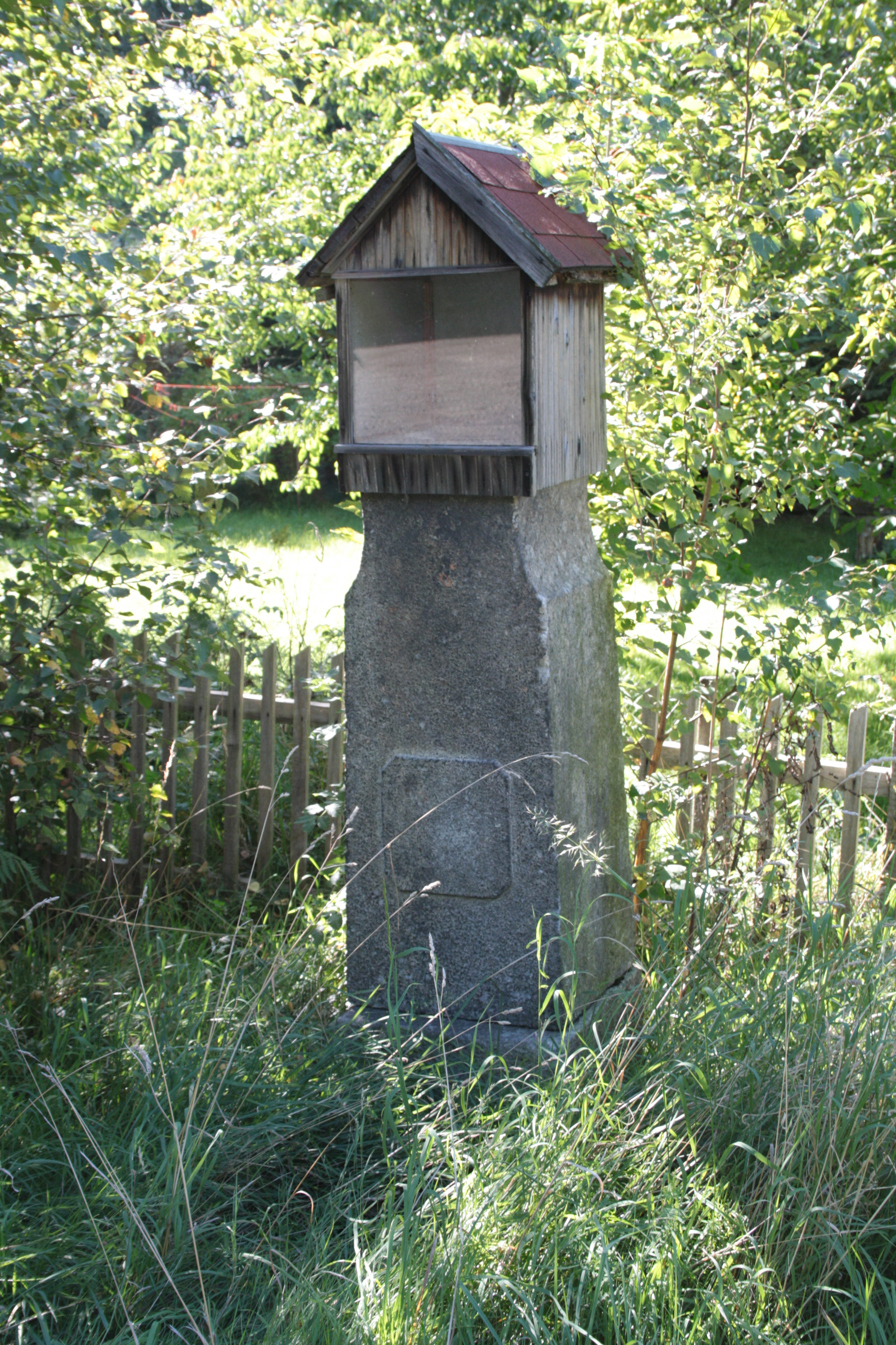 This photograph was taken with a DSLR from WMCZ's Camera grant. Boží muka v Dětřichovci, součásti Jindřichovic pod Smrkem.